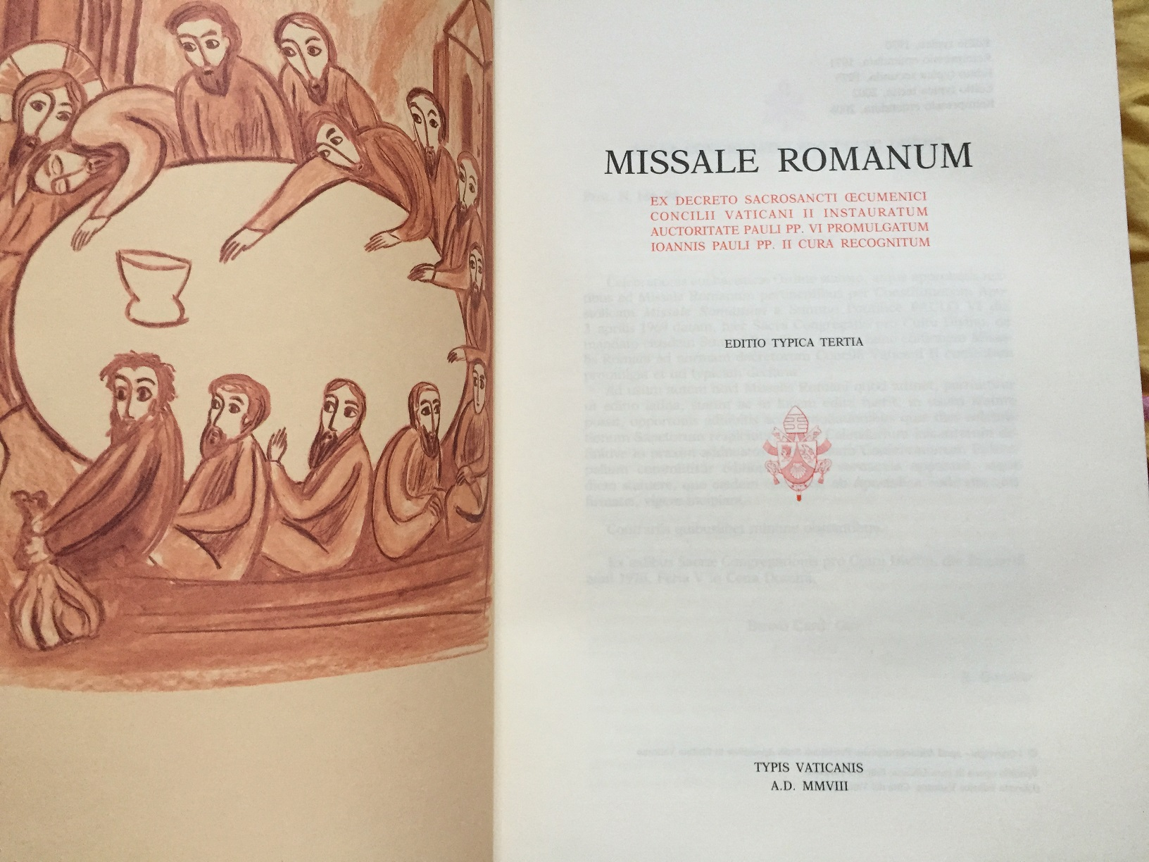 로마 미사 경본 제3표준판